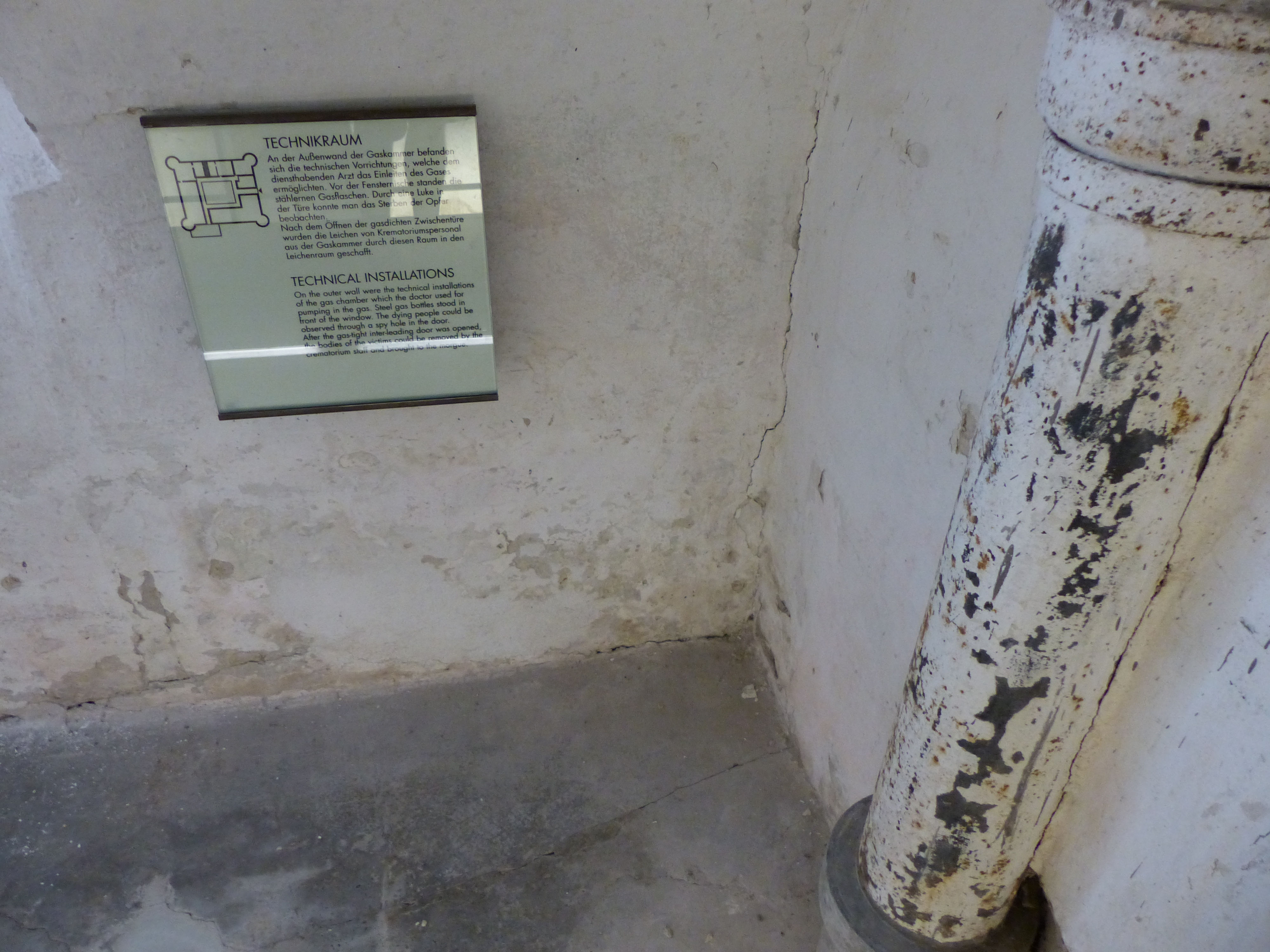 Schloss Hartheim Technikraum: Hier standen die Gasflaschen und von hier aus wurde auch das Gas in die Gaskammer eingeleitet.